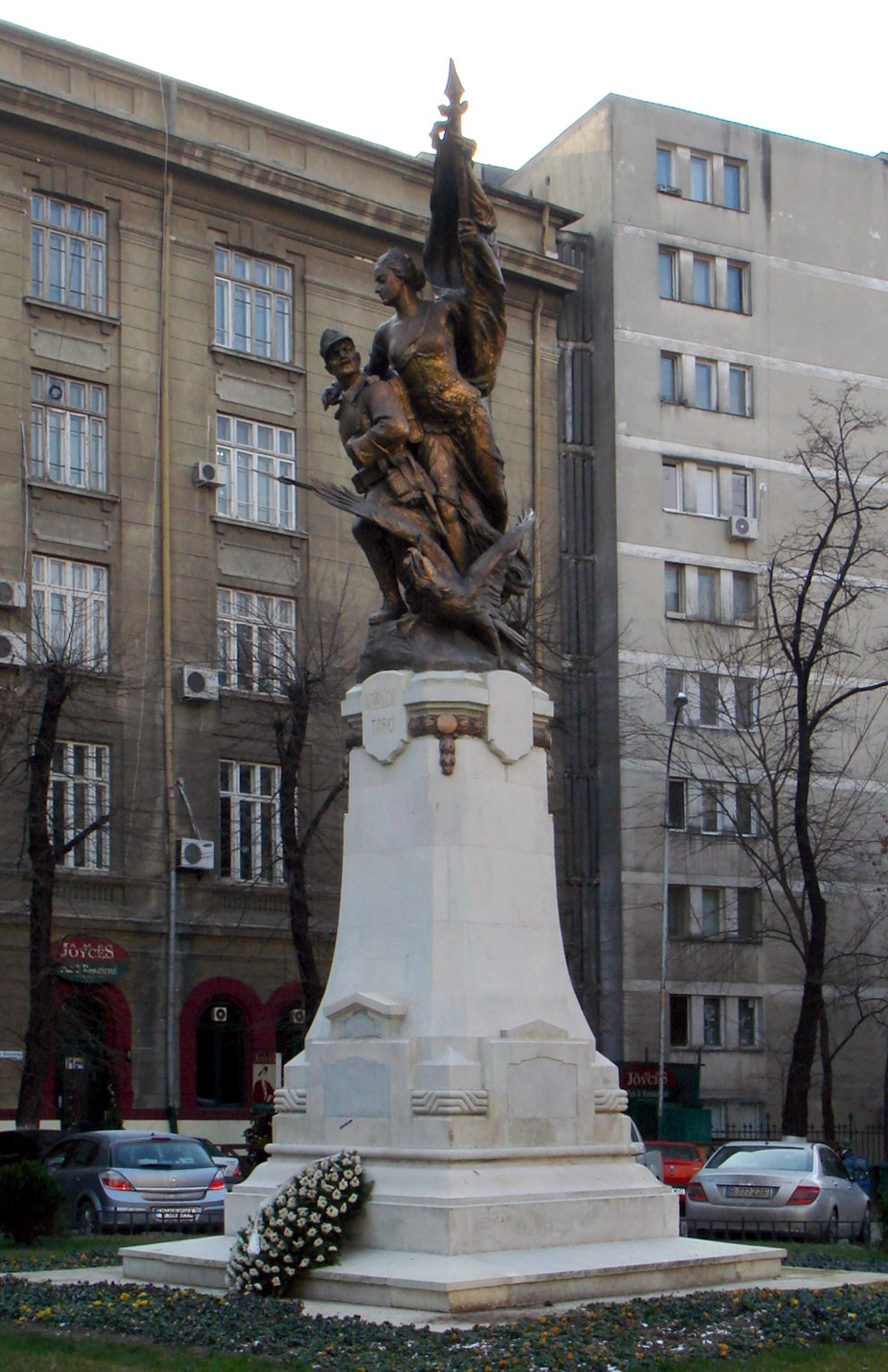 Avântul Ţării - sculptor Emil Wilhelm Becker